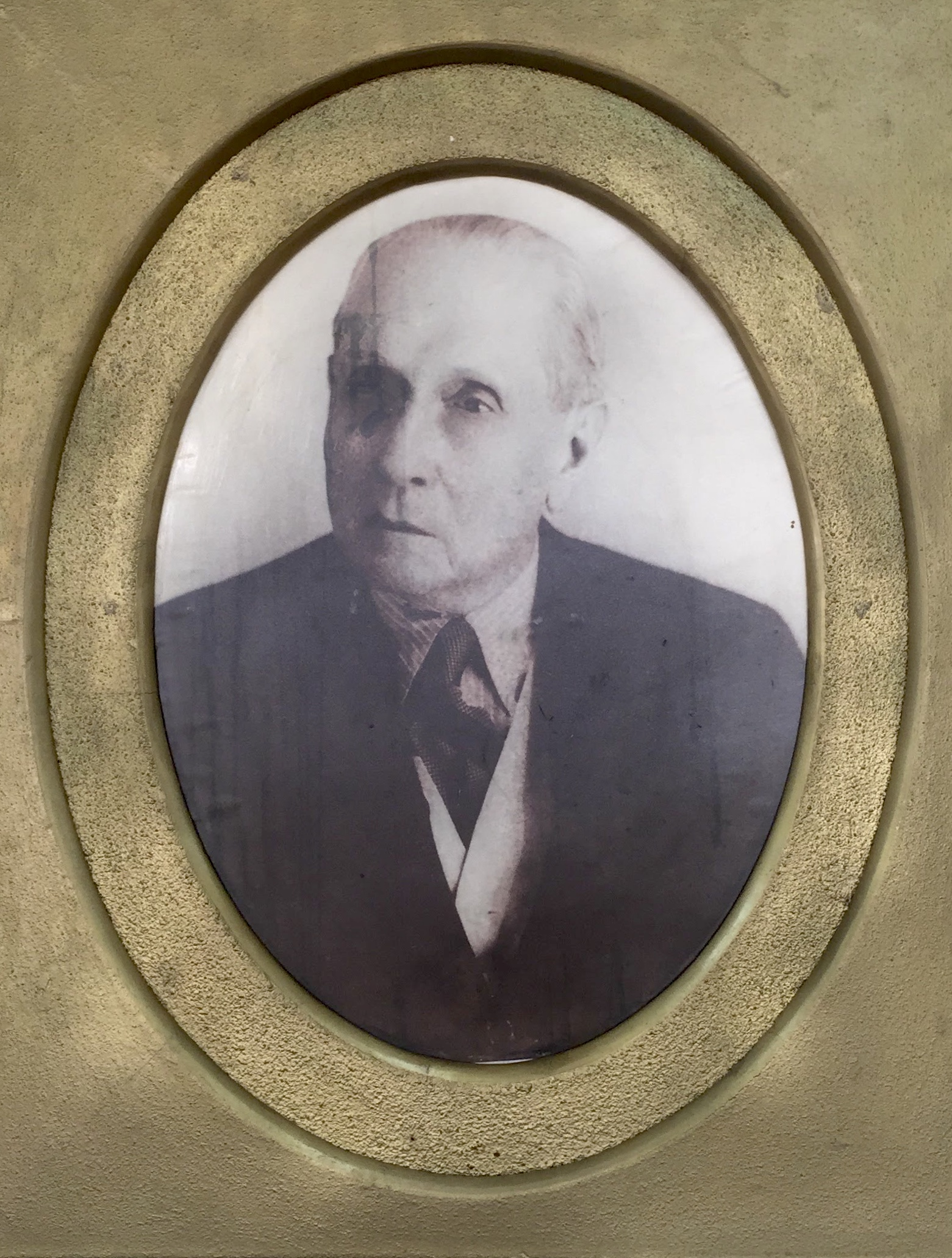 Retrato del diplomático, jurista y académico Simón Planas Suárez (1879-1967).